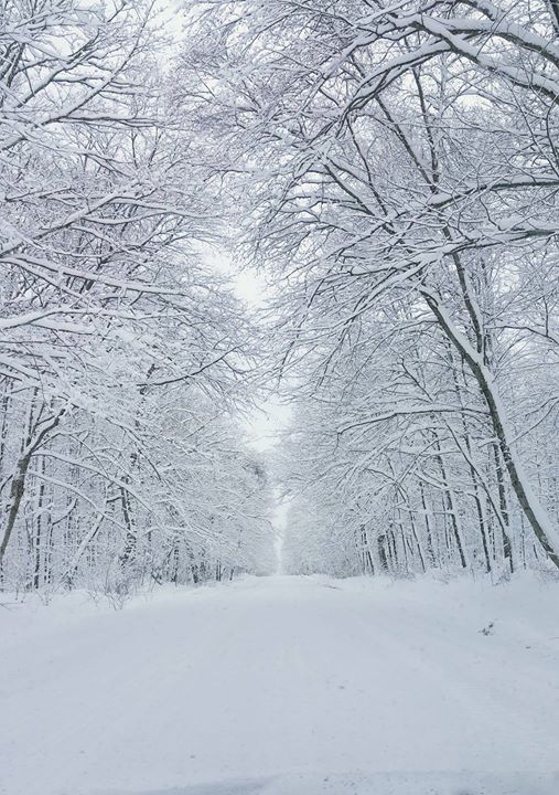 La Route de L'Église-Nord, reliant le Rang Taché-Ouest et le village situé sur la route 216, à l'hiver 2016.